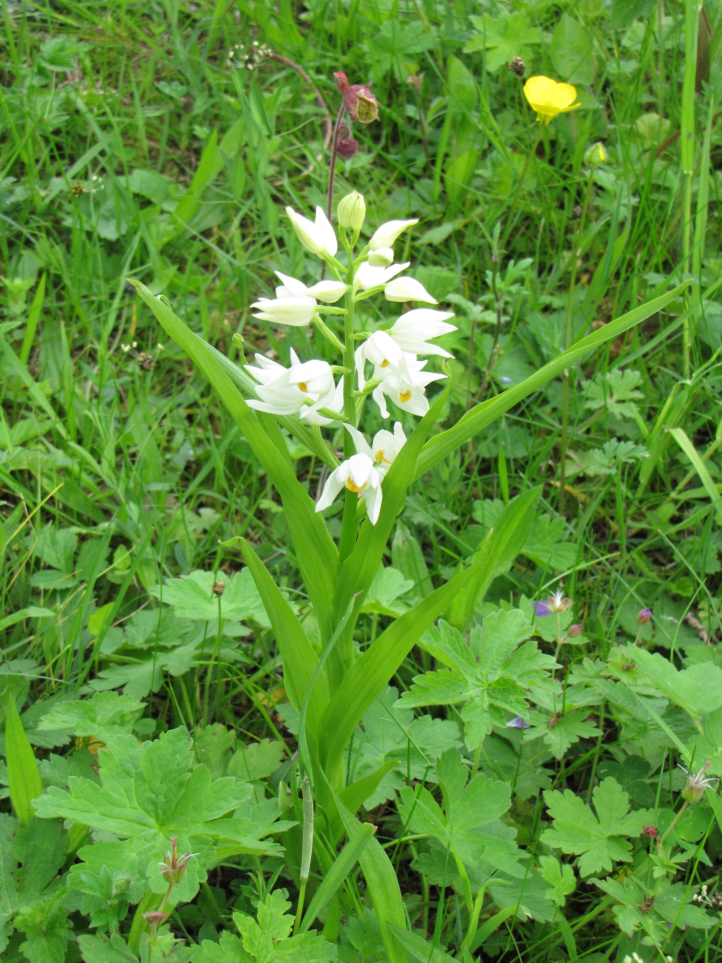 Alvena lindaräng är ett änge på östra Gotland.